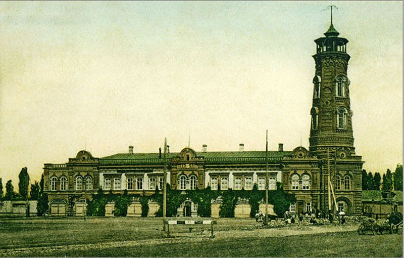 Царицын. Пожарная каланча